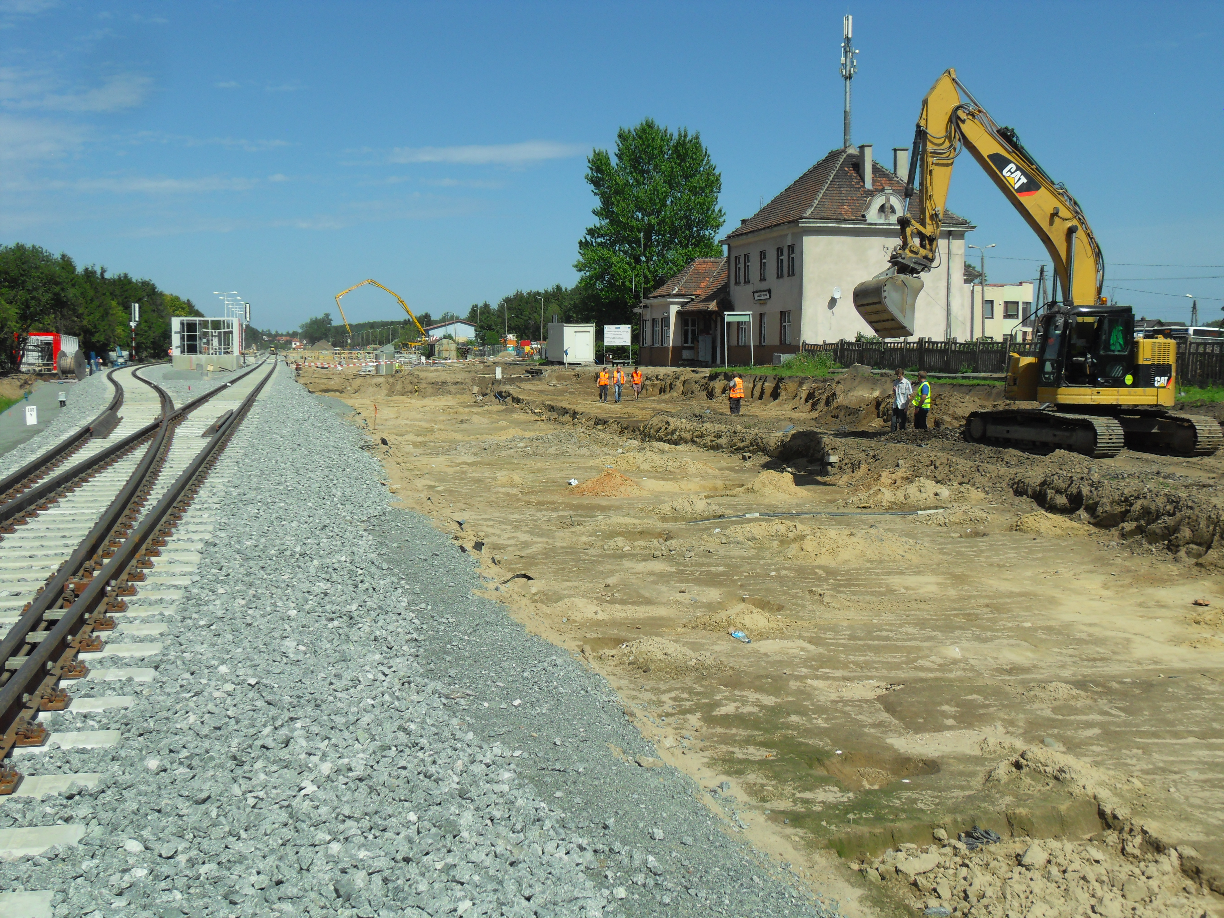 Stacja Gdańsk Osowa, przebudowa przed włączeniem do Pomorskiej Kolei Metropolitalnej (PKM).